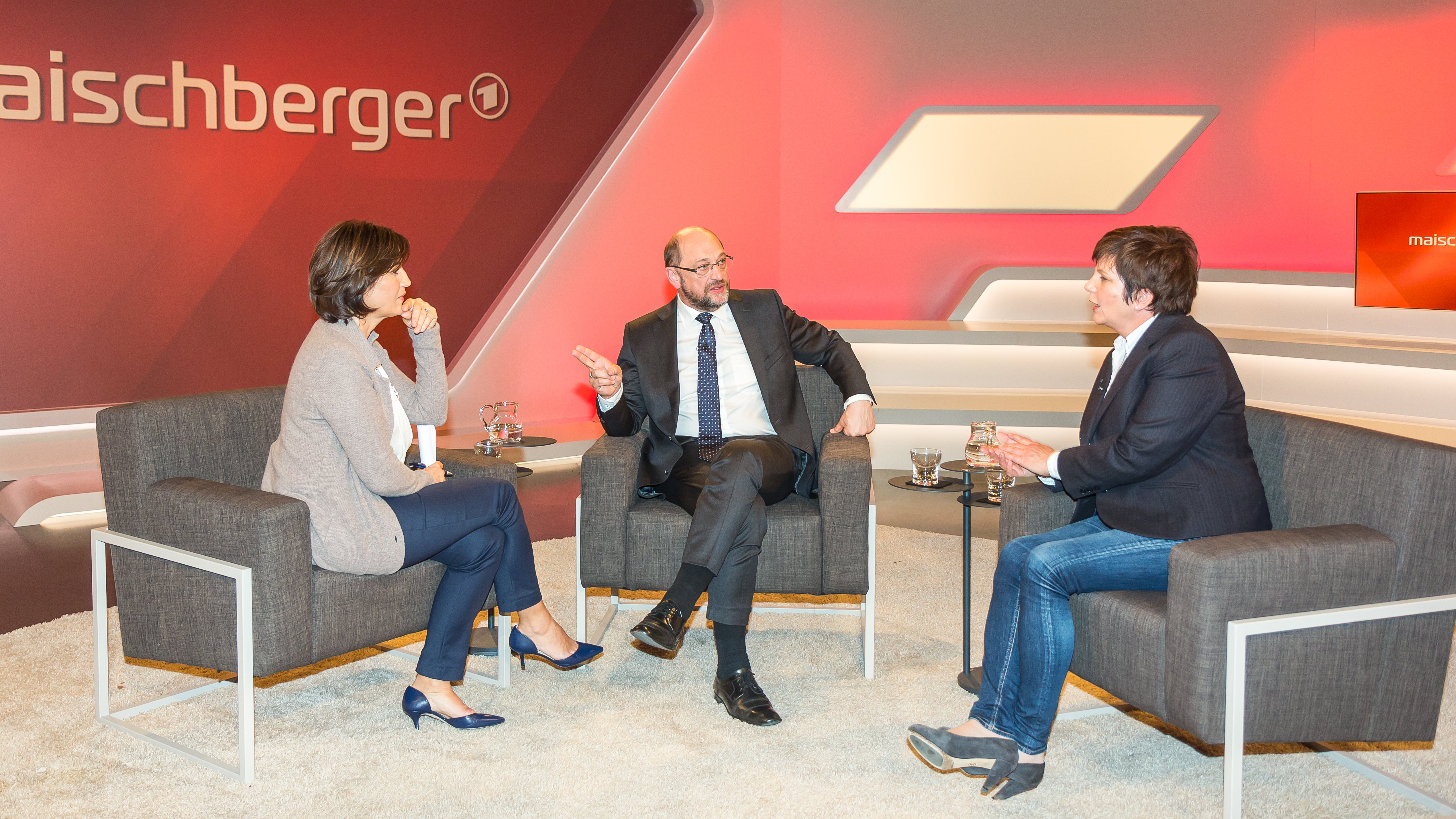 MAISCHBERGER am 24. Mai 2017 in Köln. Produziert vom WDR. Zu Gast: Martin Schulz, SPD (Parteivorsitzender) Foto: Schlussszene mit Sandra Maischberger, Martin Schulz und Wirtschaftsjournalistin Ursula Weidenfeld